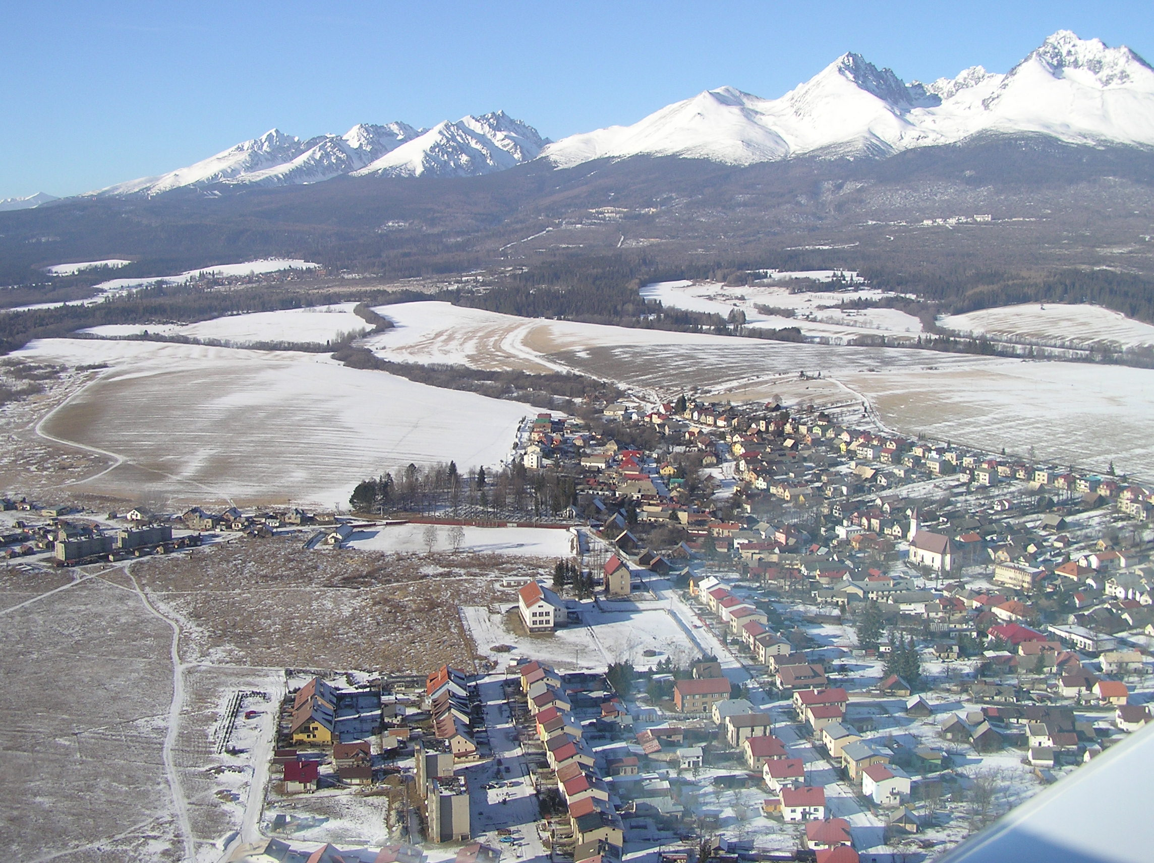 Foto urobené 16.01.2005 pri vyhliadkovom lete ponad Podtatranskú kotlinu. Foto urobil Kristián Slimák Kategória:Panorámy Kategória:Presunúť_na_Commons